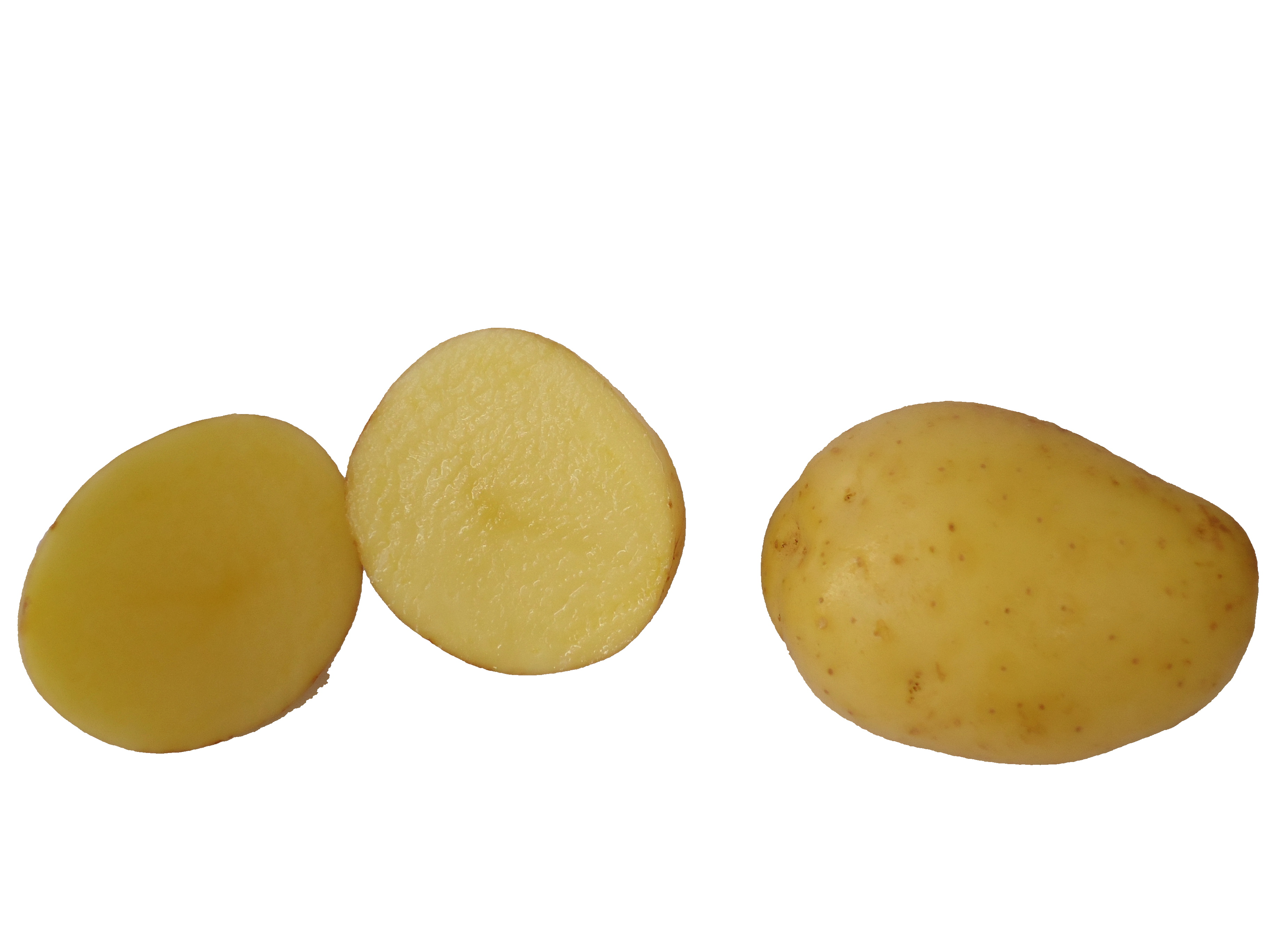 LUCAS RAMPASSO VULGO BATATINHA Me liga +5515996096656.